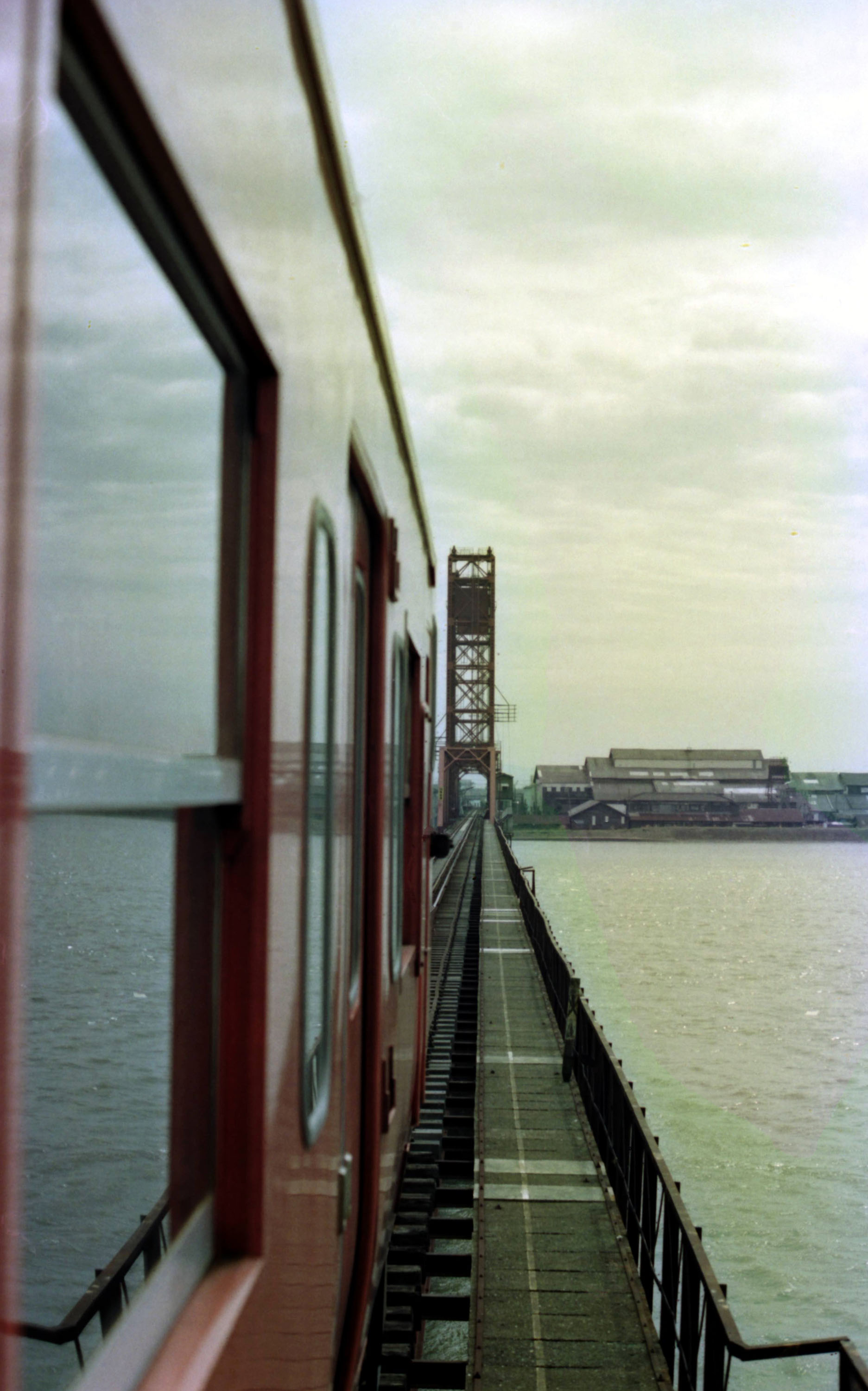 国鉄 佐賀線 筑後川橋梁